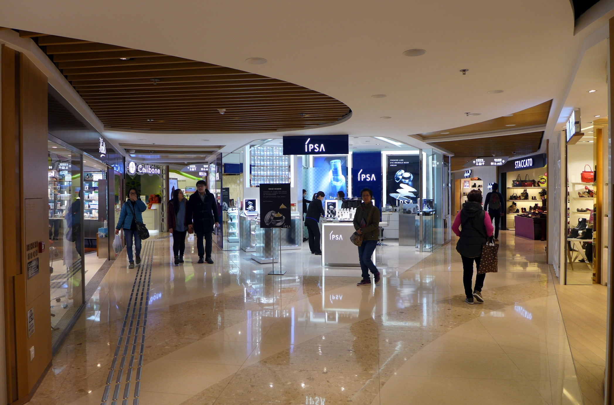 Luk Yeung Galleria Level 1